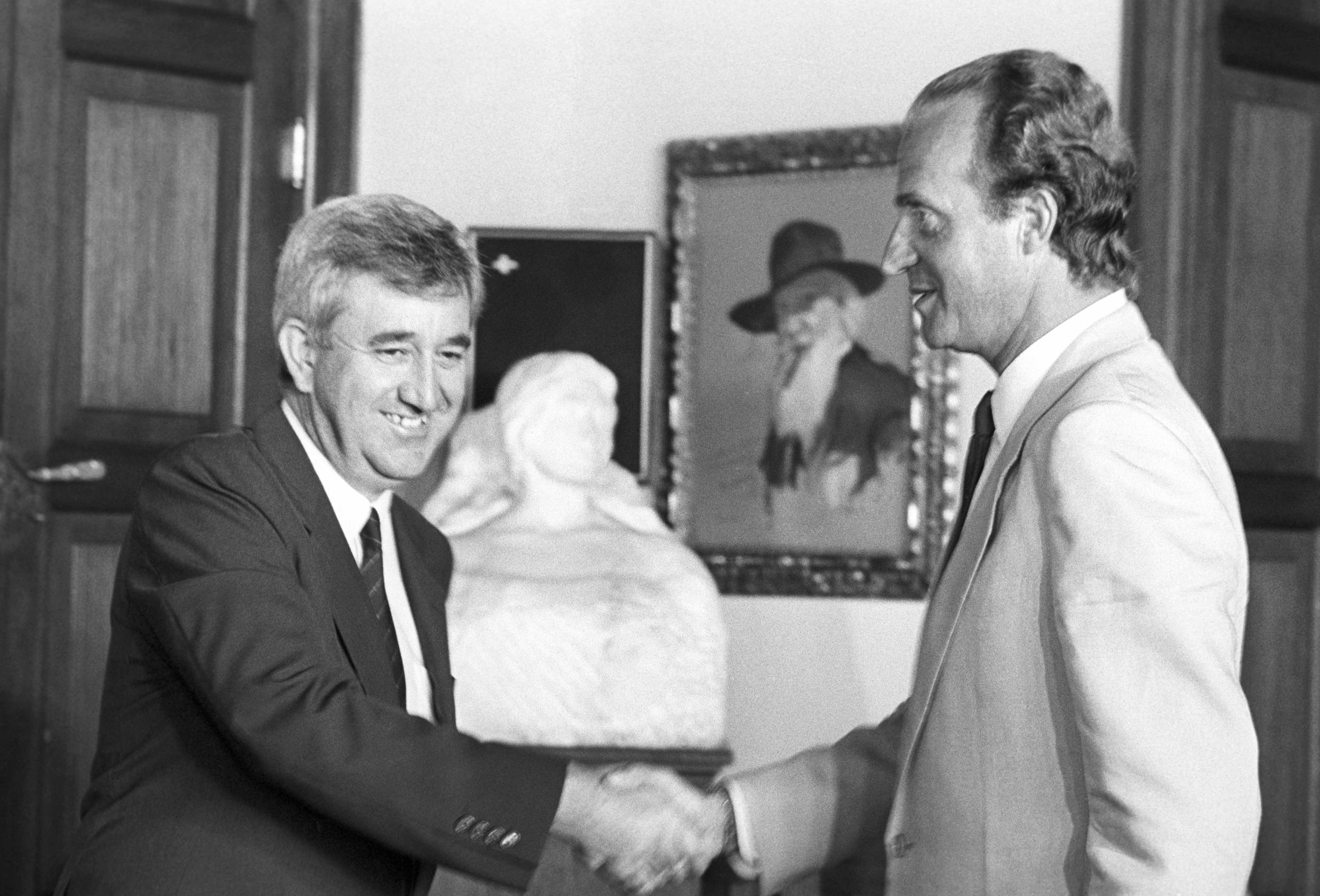 El president Gabriel Cañellas lliurà a Sa Majestat el Rei Joan Carles I la Medalla d'Or de la Comunitat Autònoma en una audiència al Palau de Marivent.